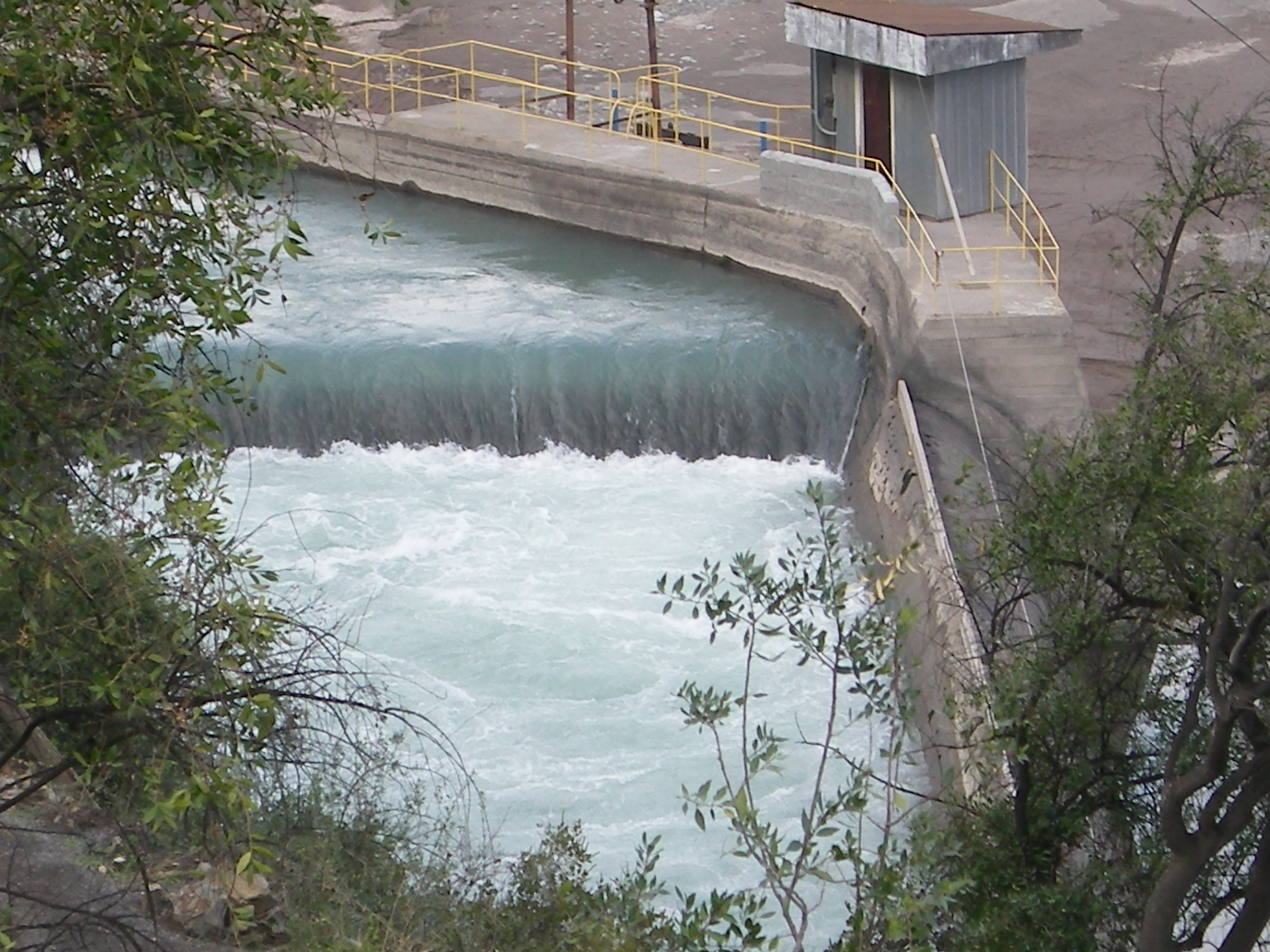 Canal Central Hidroeléctrica Sauzalito.